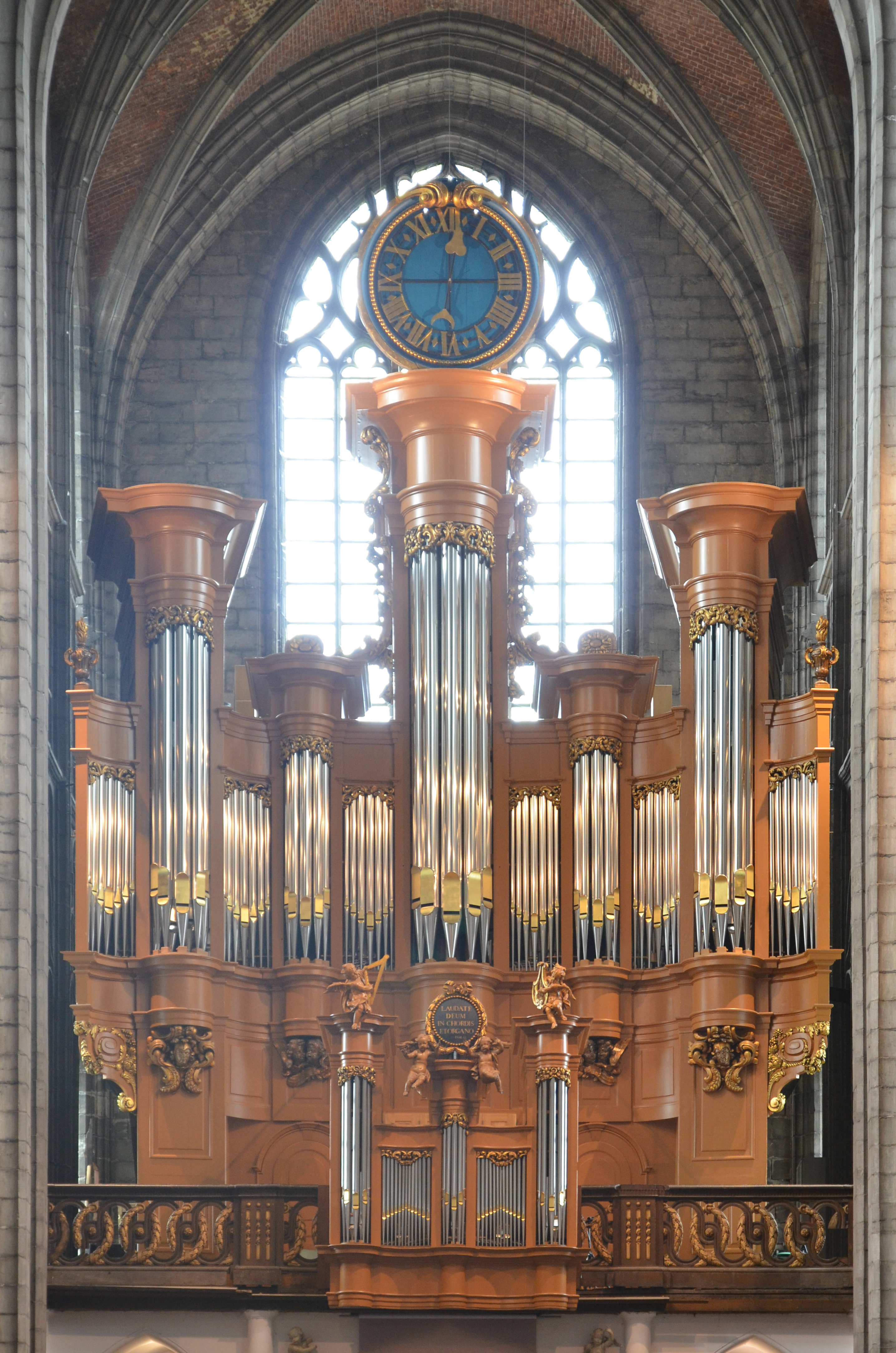 Mons (Belgique) - Collégiale Sainte-Waudru - Grandes orgues après leur restauration terminée en 2018 vues depuis la nef.